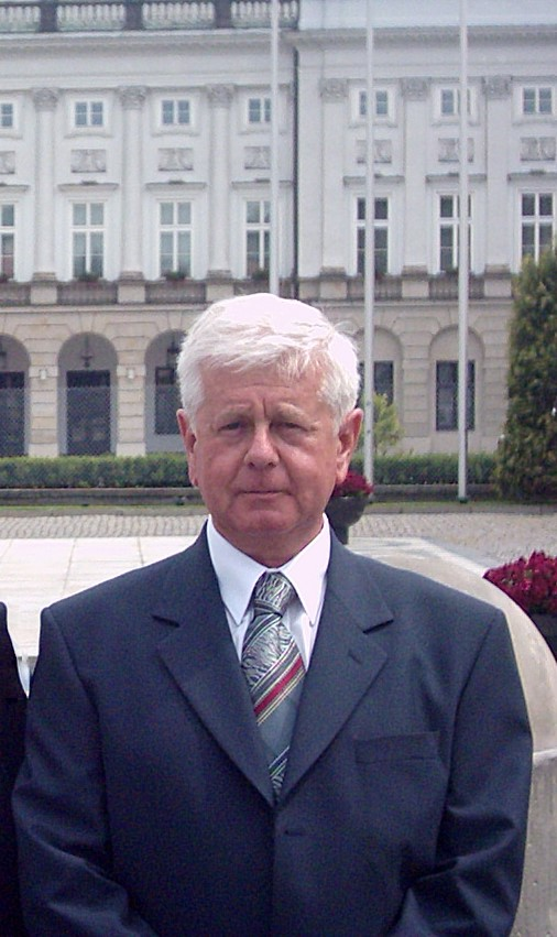 Adam Niedzielski